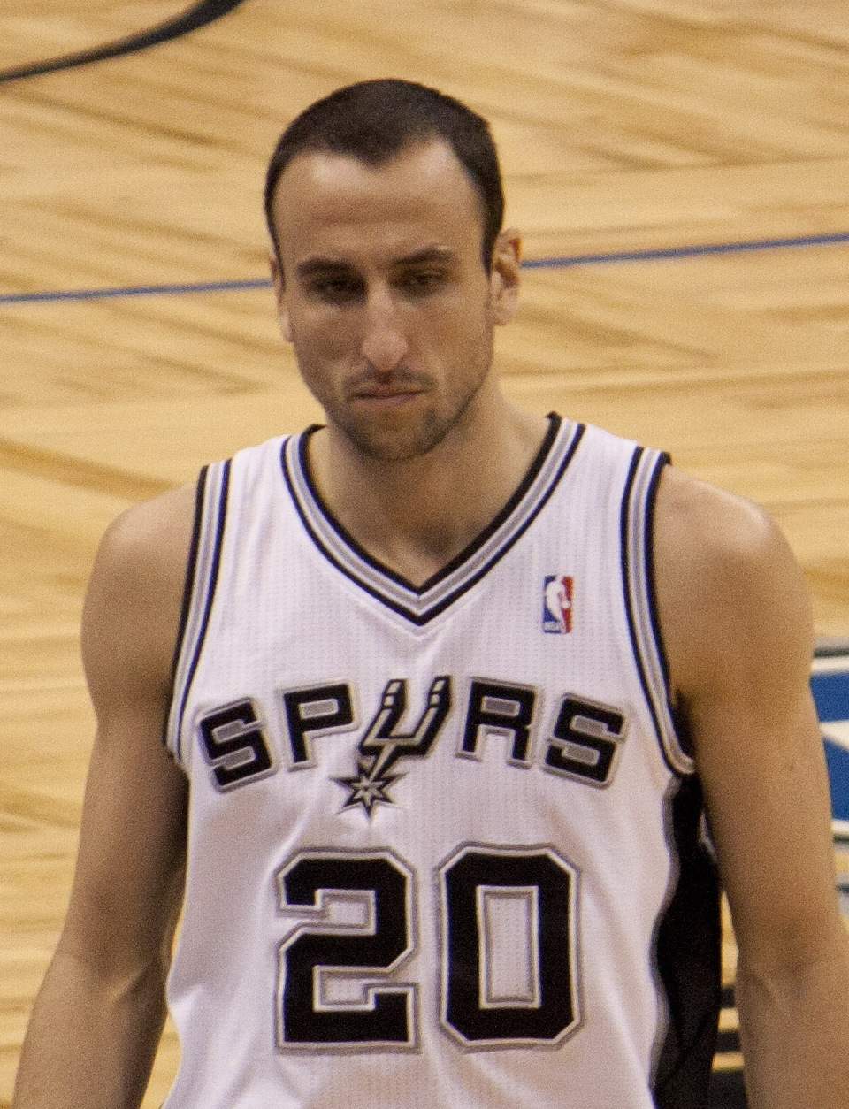 Manu Ginóbili